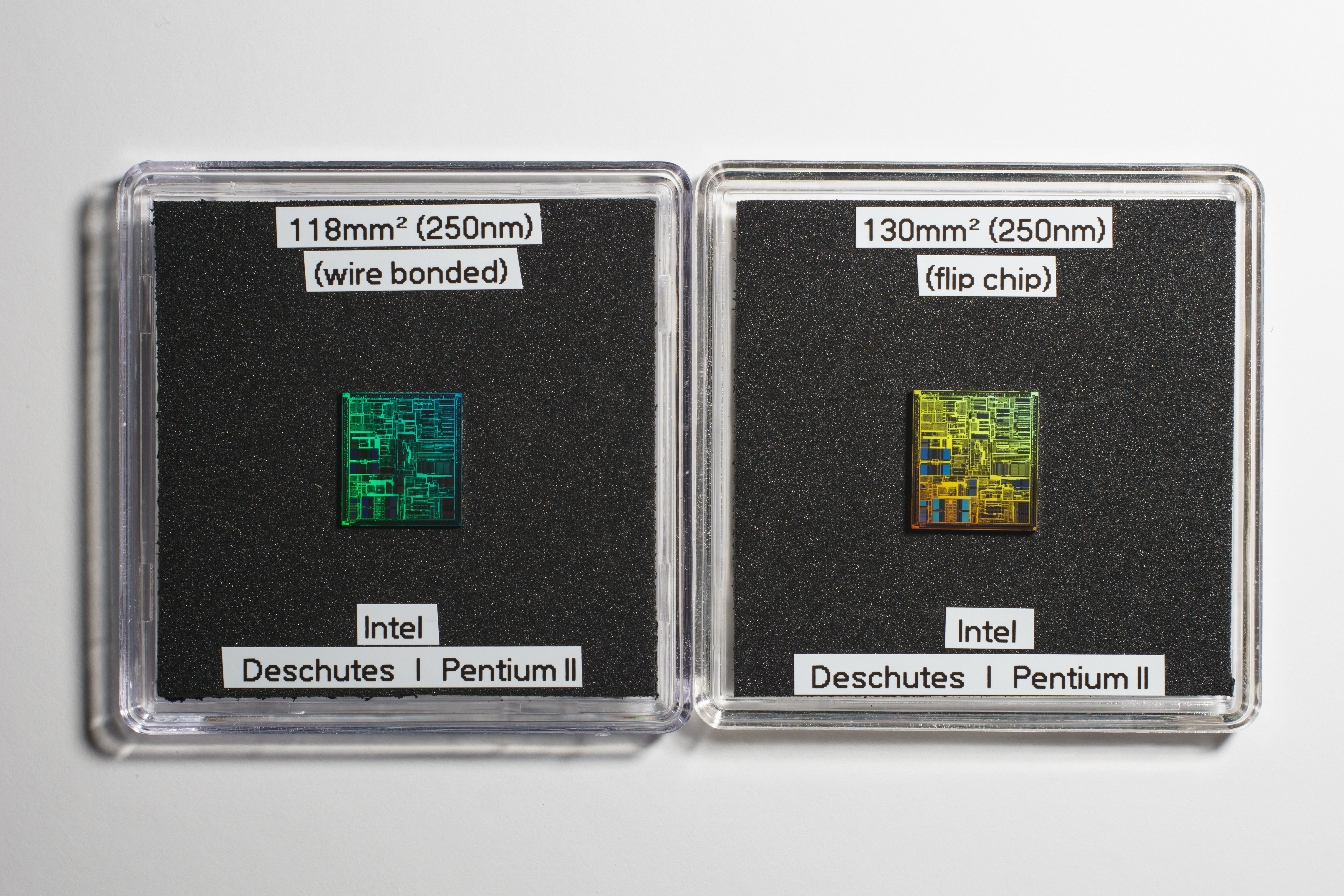 pentium_II_-_deschutes_compare___3